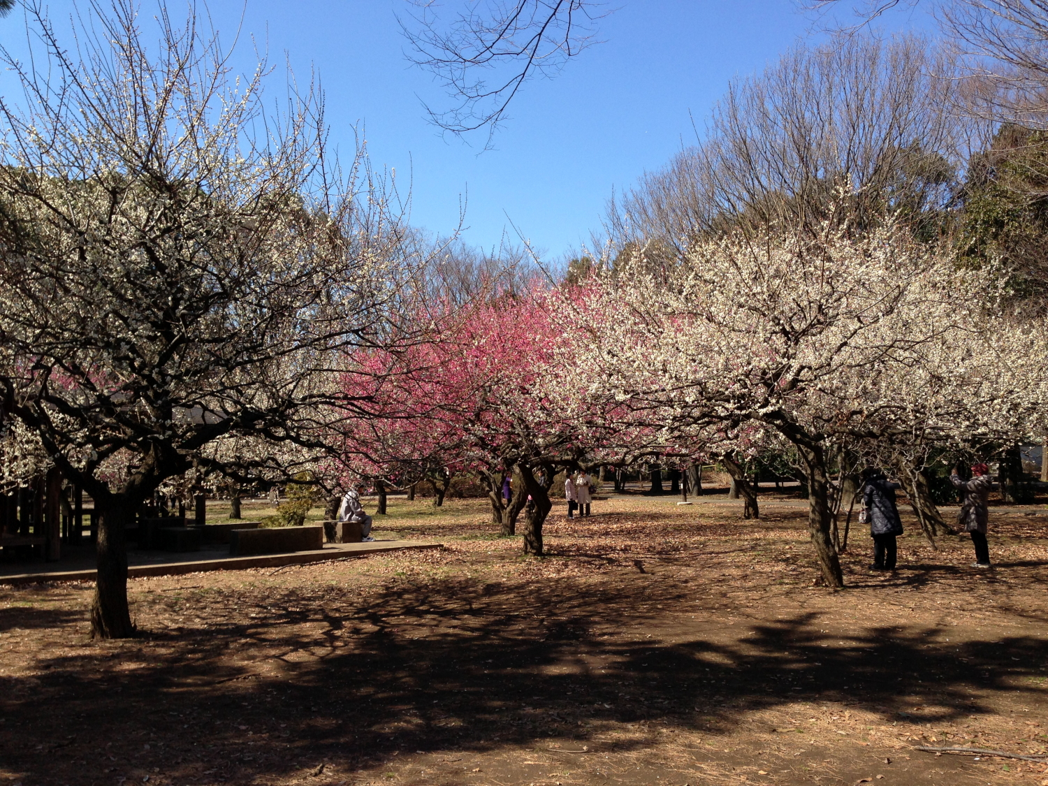 世田谷区にある「砧公園」内の梅林